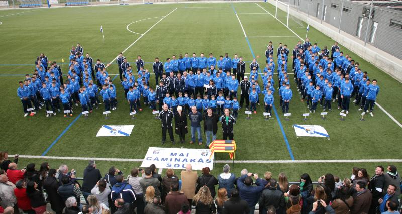 Futbol Almeda